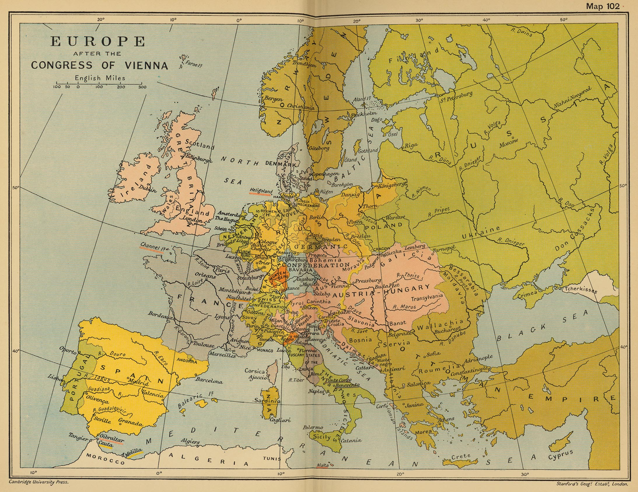 Europa na het Congres van Wenen, 1815 Europe after the Congress of Vienna. Afbeelding afkomstig van page (file). The following maps are from "The Cambridge Modern History Atlas" edited by Sir Adolphus William Ward, G.W. Prothero, Sir Stanley Mordaunt Leathes, and E.A. Benians. Cambridge University Press; London. 1912.[1] Most of the maps scanned by the University of Texas Libraries and served from this web site are in the public domain. No permissions are needed to copy them. You may download them and use them as you wish. A few maps are copyrighted, and are clearly marked as such.[2]